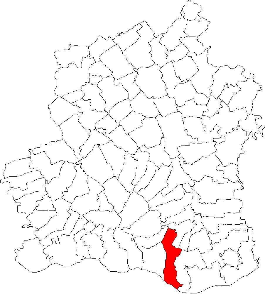 Categorie:Hărţi ale judeţului Teleorman